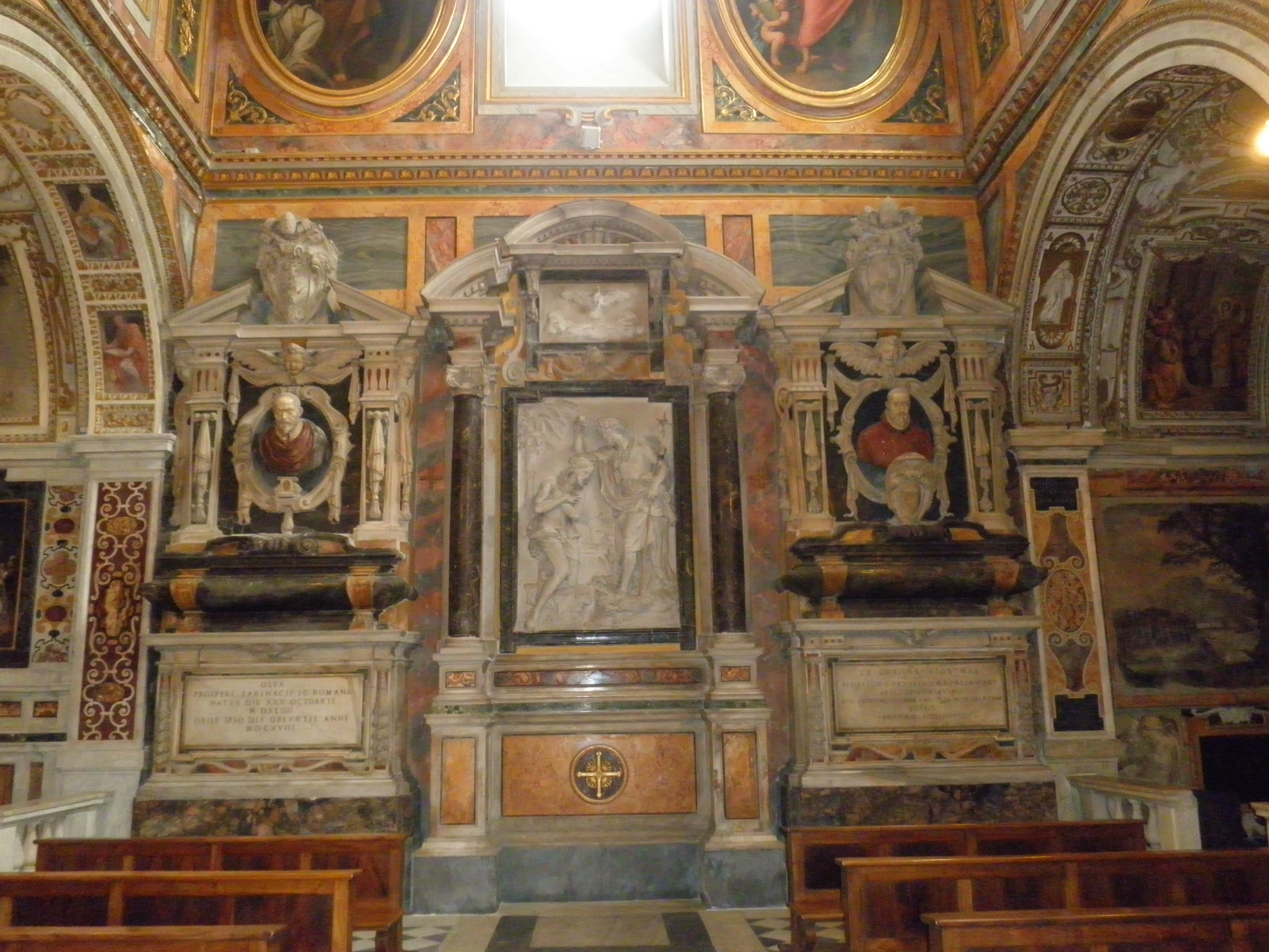 Roma, san Silvestro al Quirinale: controfacciata